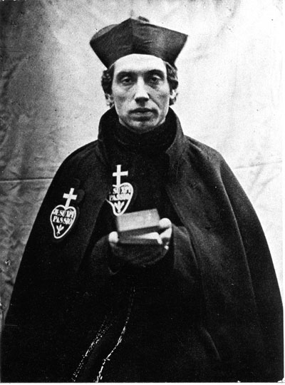 reproduction d'une photo de Charles Houben